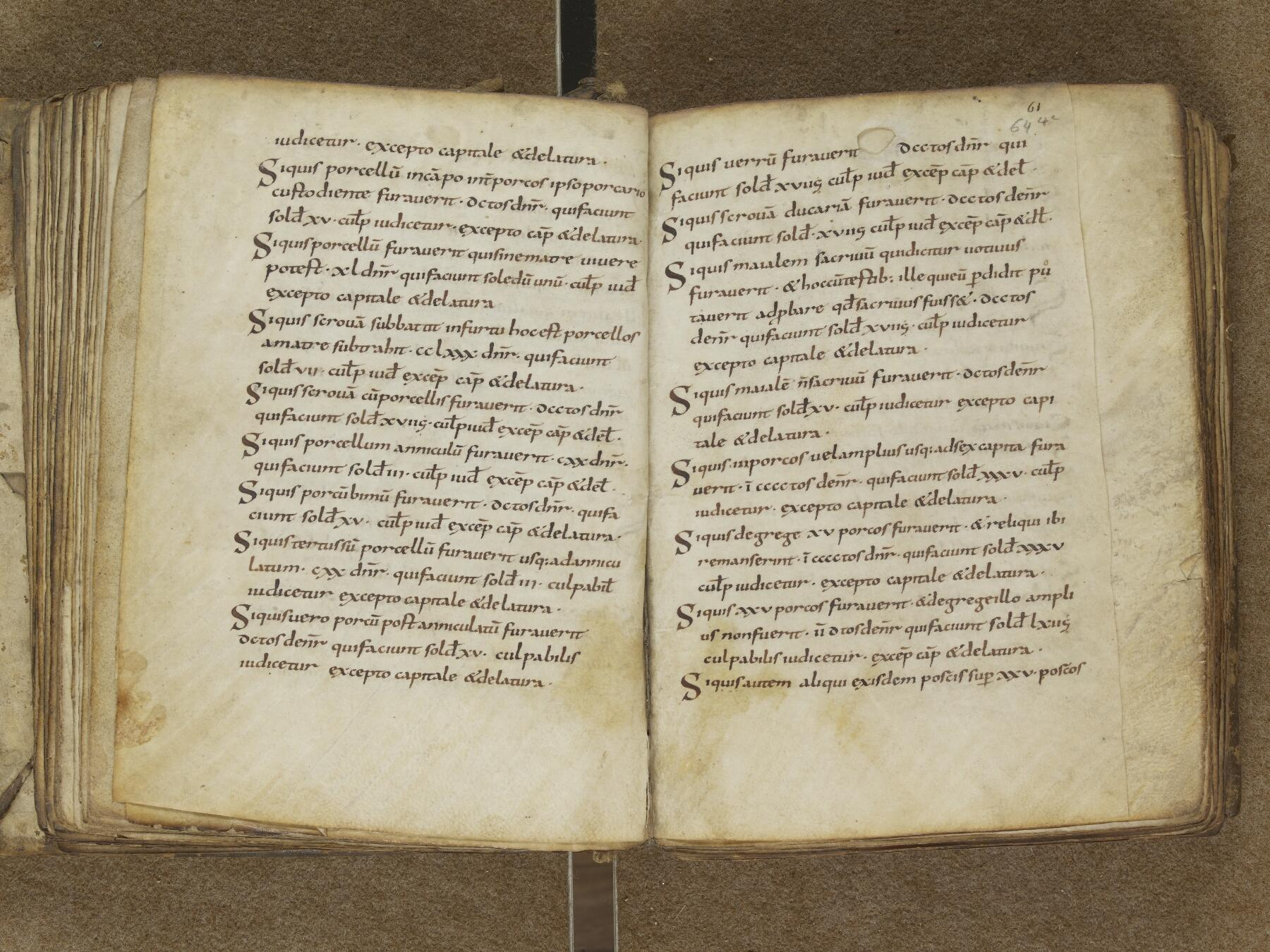 Lex Salica